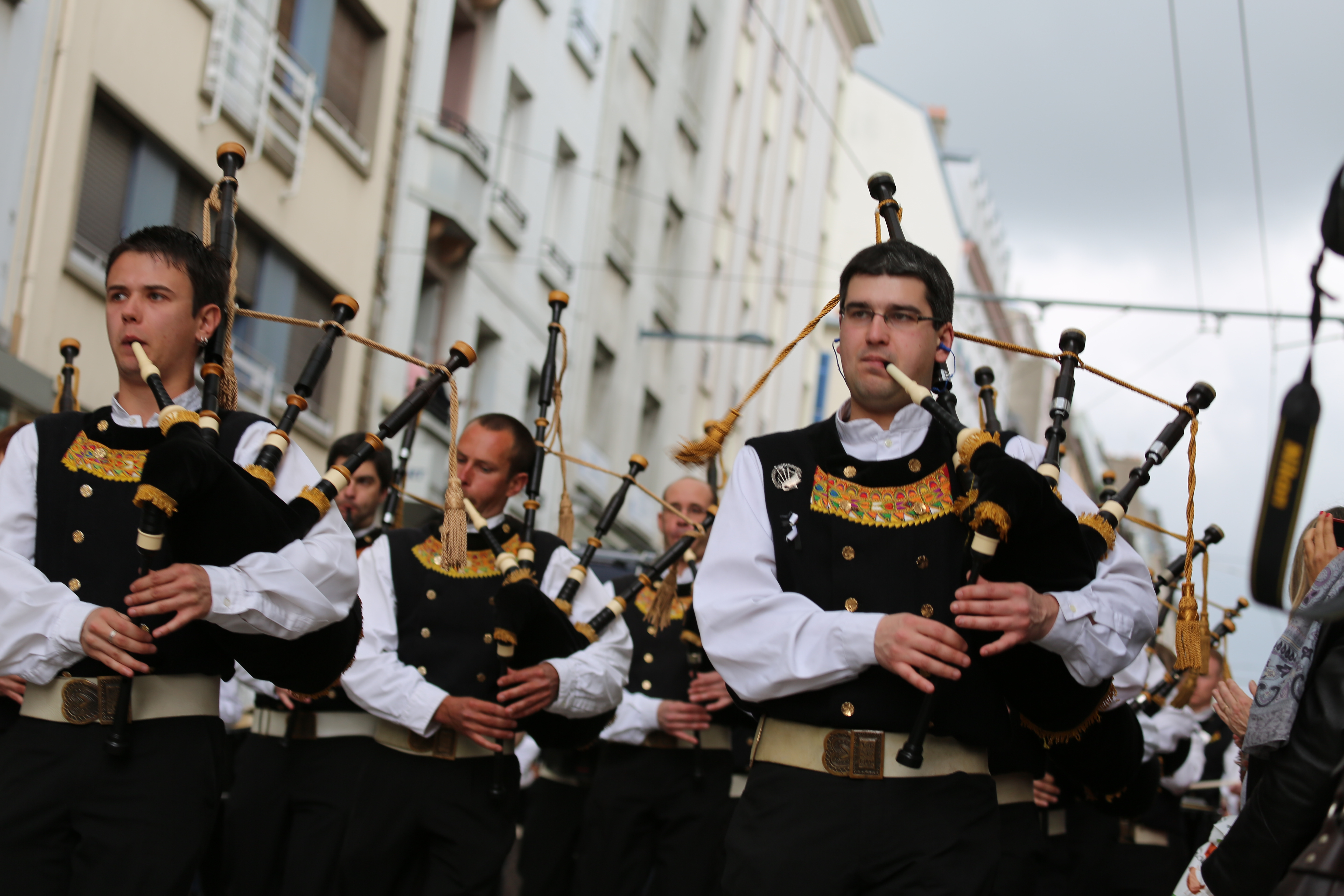 Photo de la parade du printemps des sonneurs le 19 mai 2012 à Brest